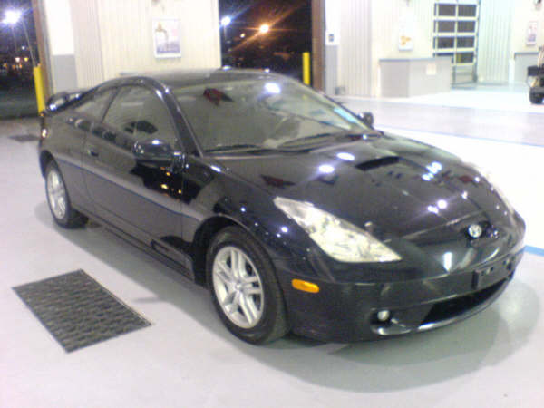 coche de Toyota